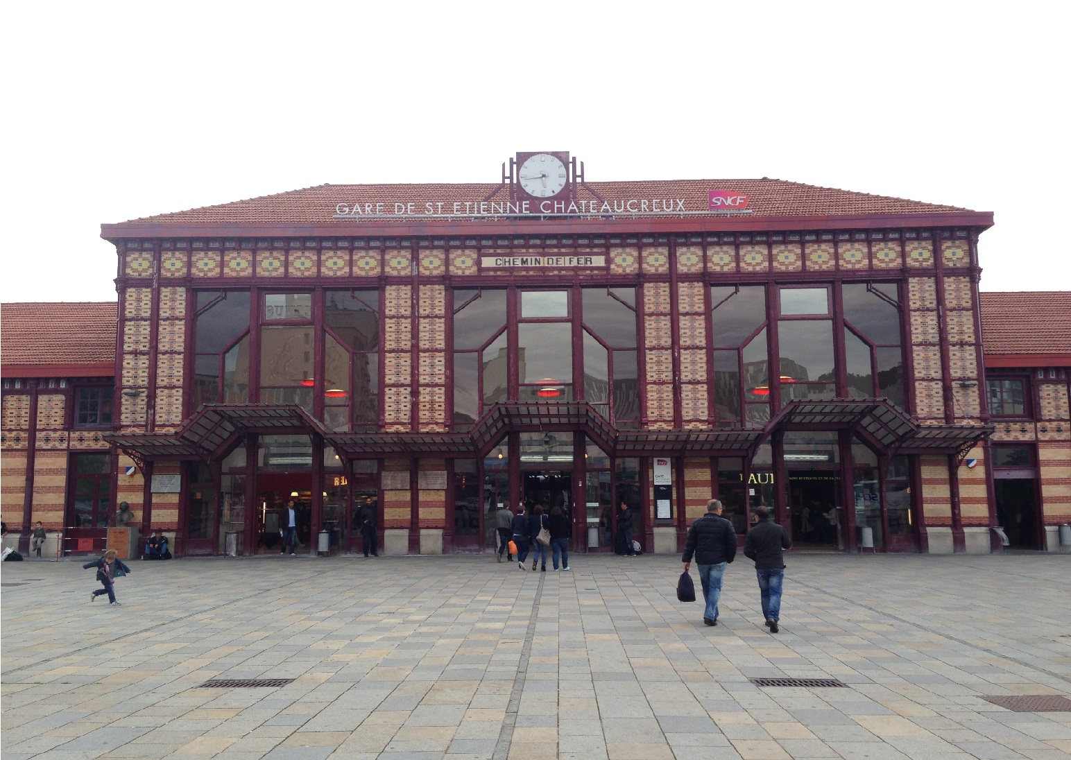 Gare de Saint-Etienne-Châteaucreux-2014